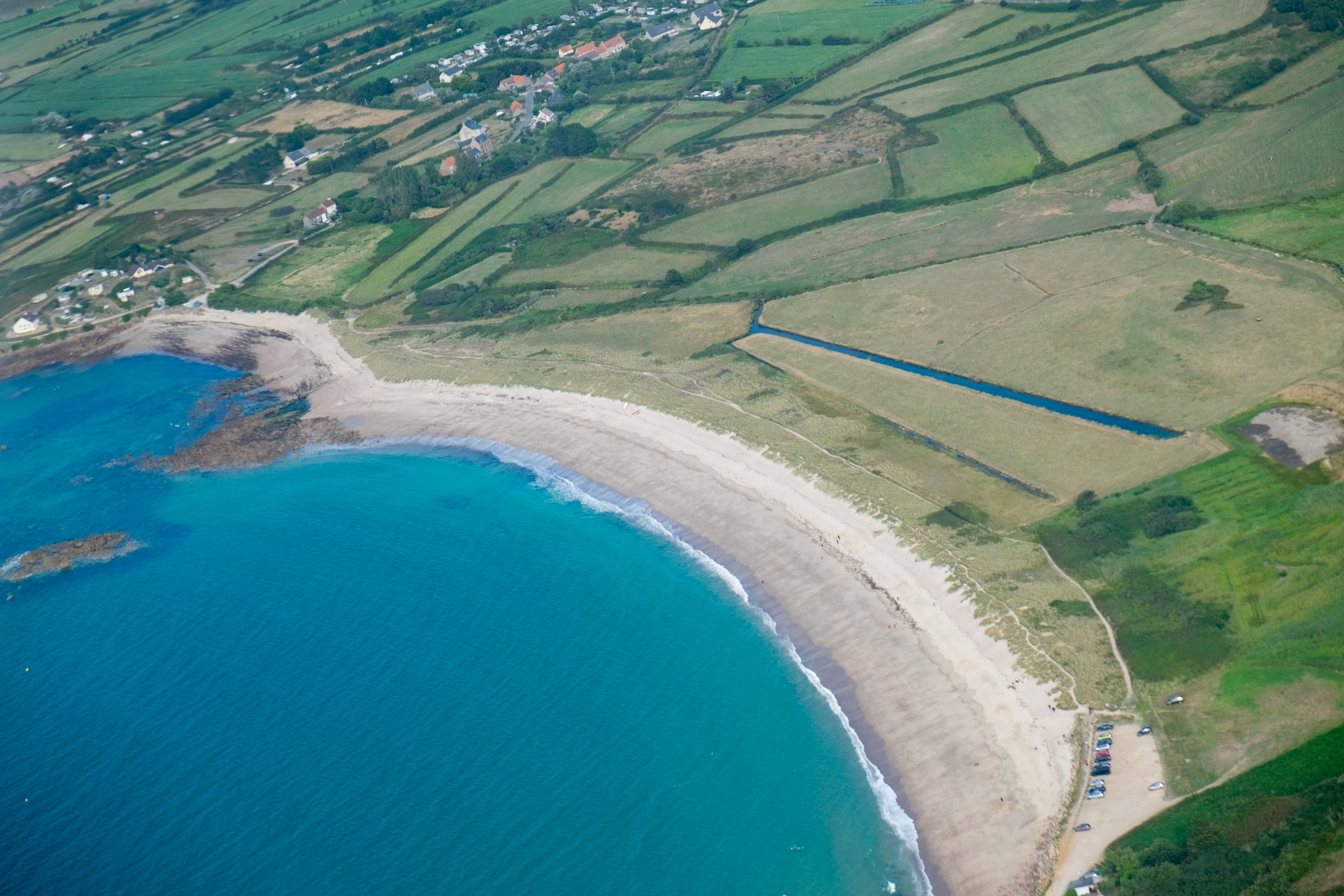 Plage de la Mondrée et plaine humide des Dyes vues d'avion.